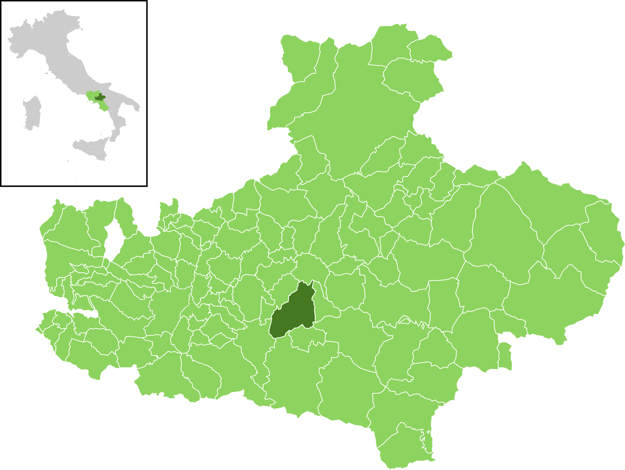 Posizione del comune all'interno della provincia di Avellino